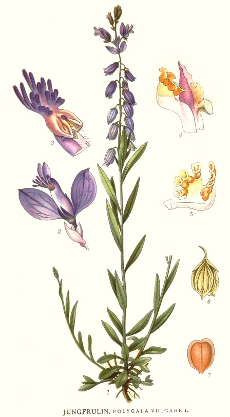 Polygala vulgaris L. Original Description Jungfrulin, Polygala vulgare L.